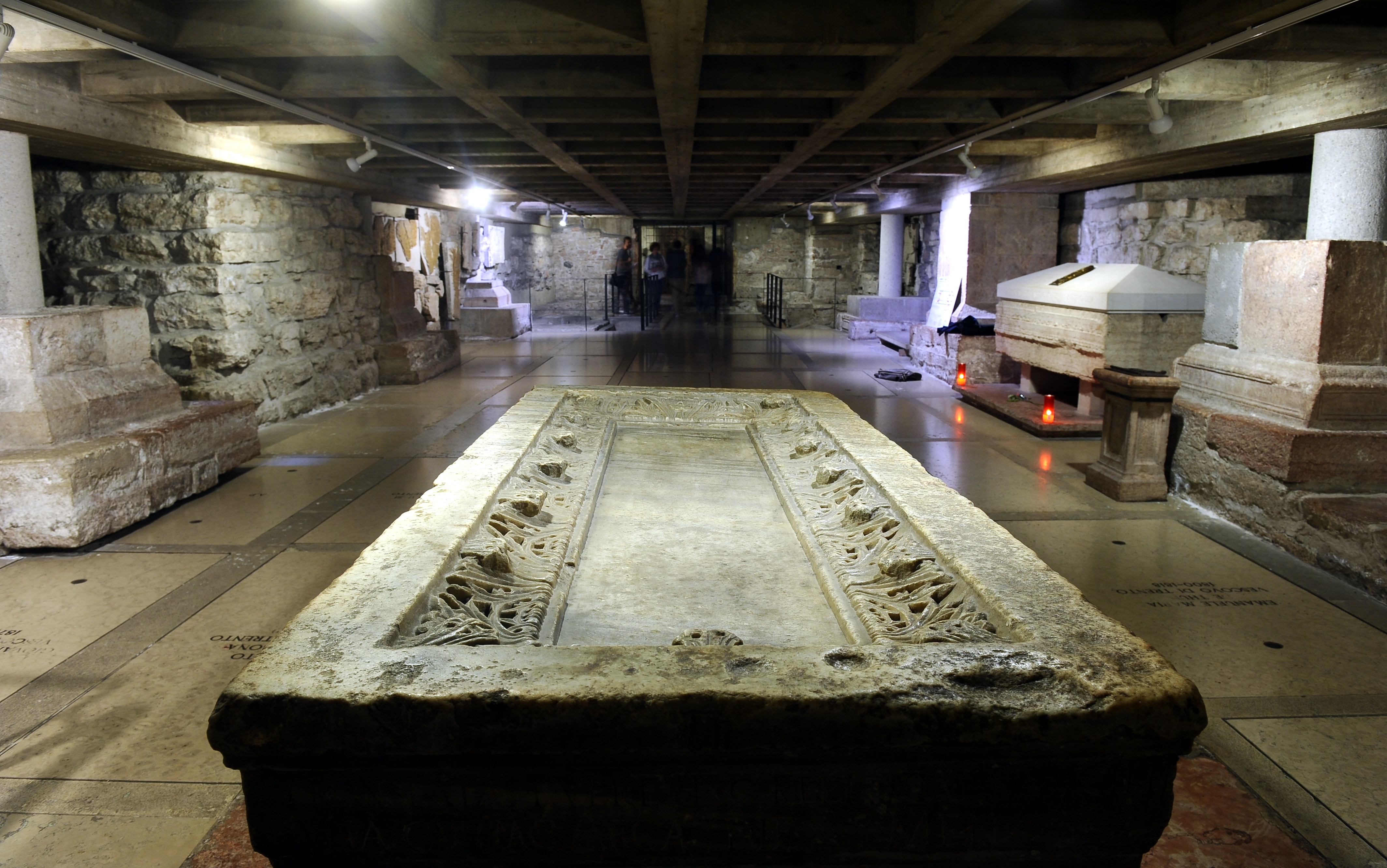 Arca di San Vigilio. Basilica Paleocristiana di San Vigilio This is a photo of a monument which is part of cultural heritage of Italy.